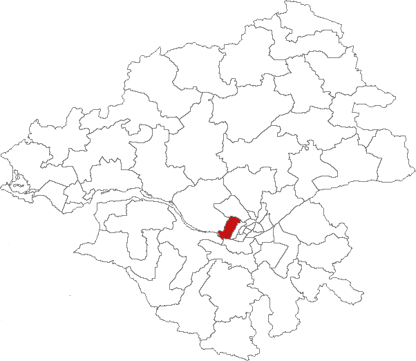 Carte de localisation du canton de Saint-Herblain-ouest (France, Loire-Atlantique)